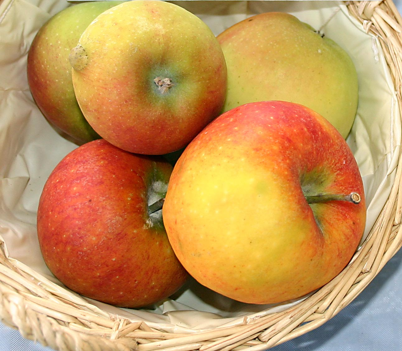 Malus "Delbarestivale" (Büdingen)